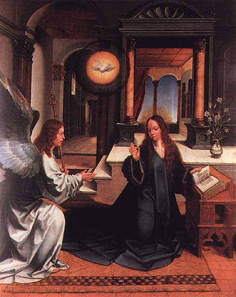 The Annunciation A Virgem Maria recebe o anjo da Anunciação numa sala de inspiração renascentista cuja parede é rasgada por uma arcaria em dois níveis, vendo-se no lado esquerdo o desenvolvimento da habitação, e do lado direito um patamar a que se acede por escadas e que por sua vez conduz a uma varanda enquadrada igualmente por arcos. Pormenor interessante é a esteira sobre a qual as duas personagens estão ajoelhadas e que se julga ser de origem congolesa.